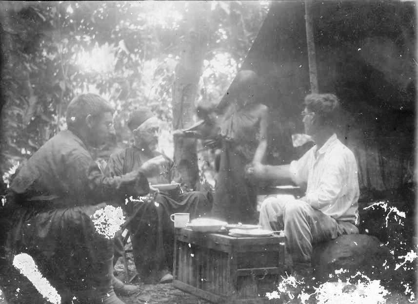 Graña junto a Mariano el Brujo y un grupo de técnicos occidentales